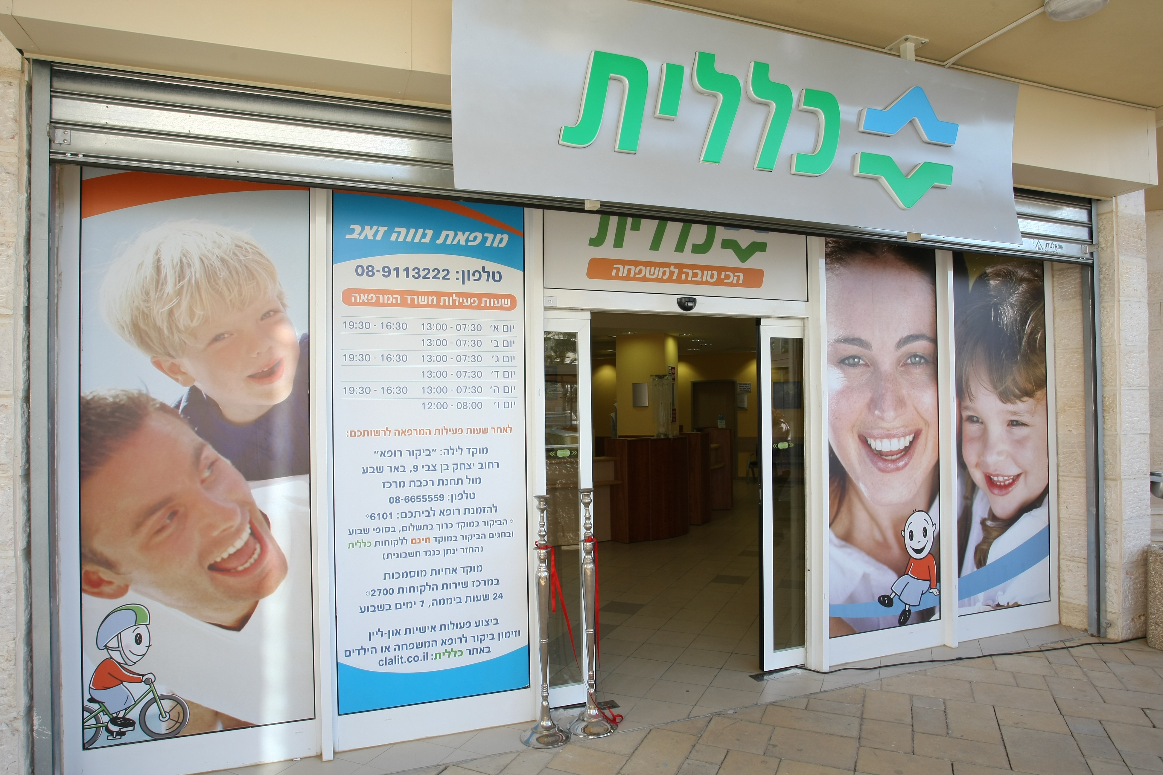 מרפאת נווה זאב של שירותי בריאות כללית, בבאר שבע